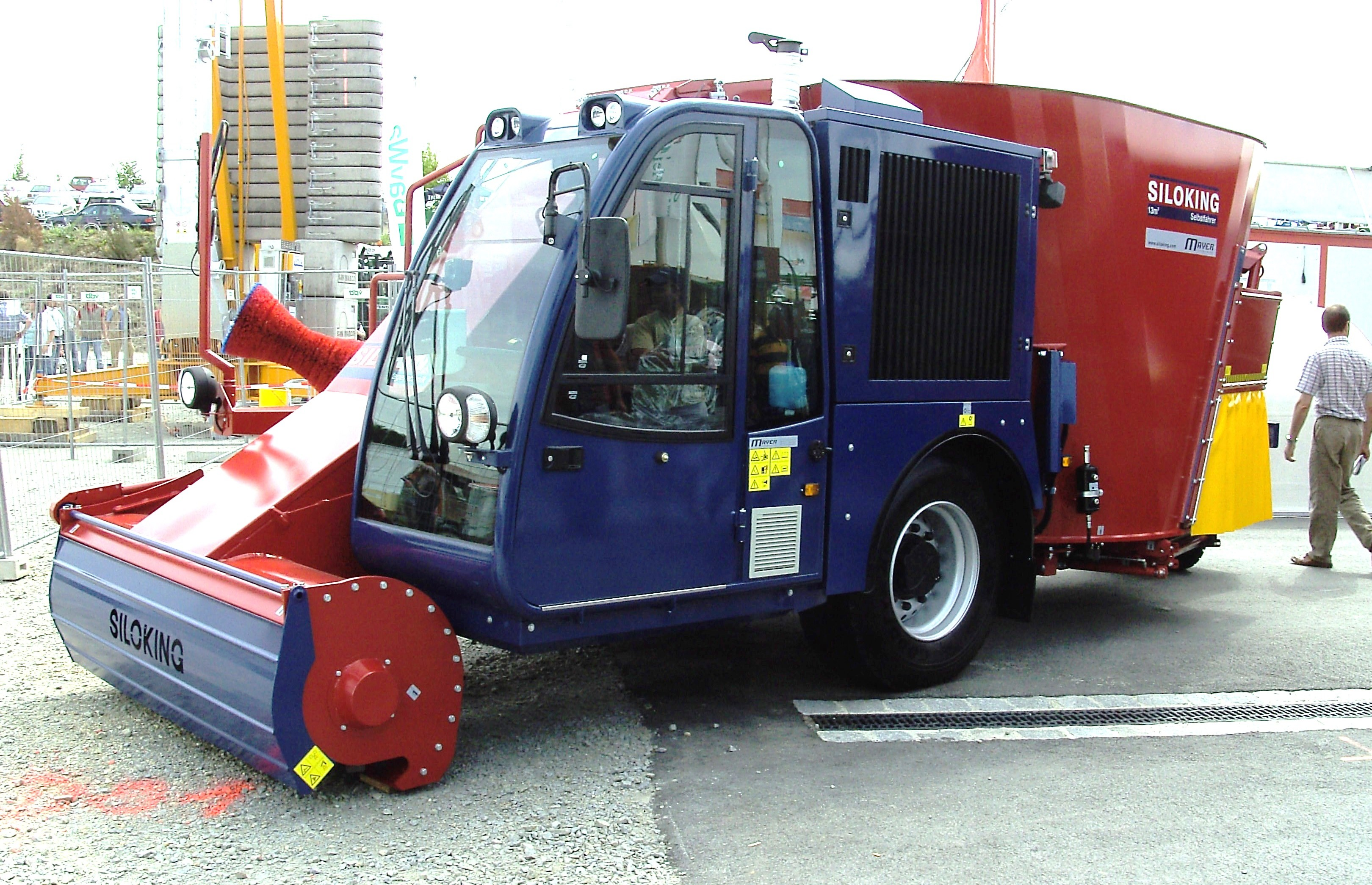 Ein SILOKING Selbstfahrender Futtermischwagen.